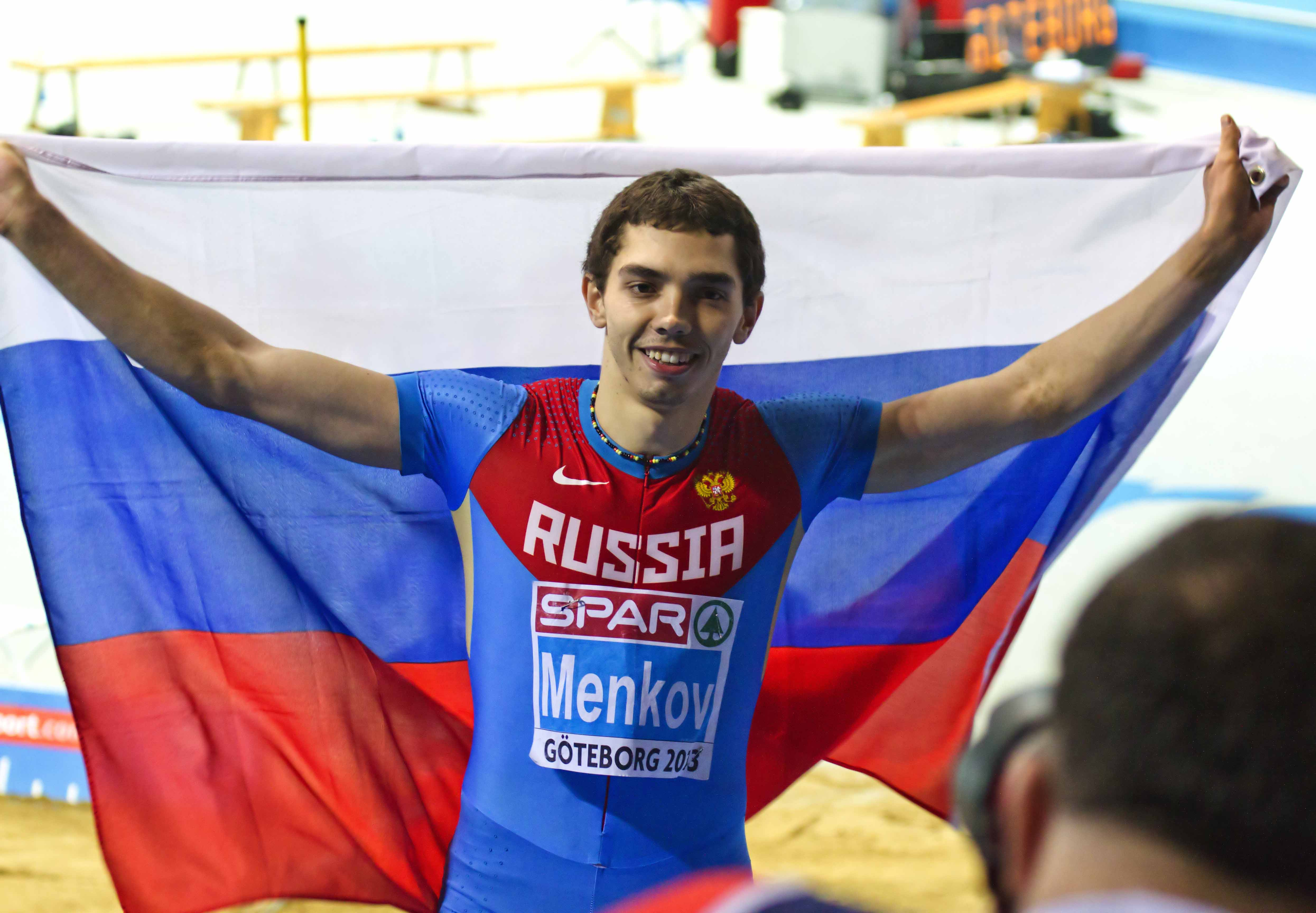 9225 winnaar verspringen